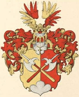 Helwigi suguvõsa aadlivapp